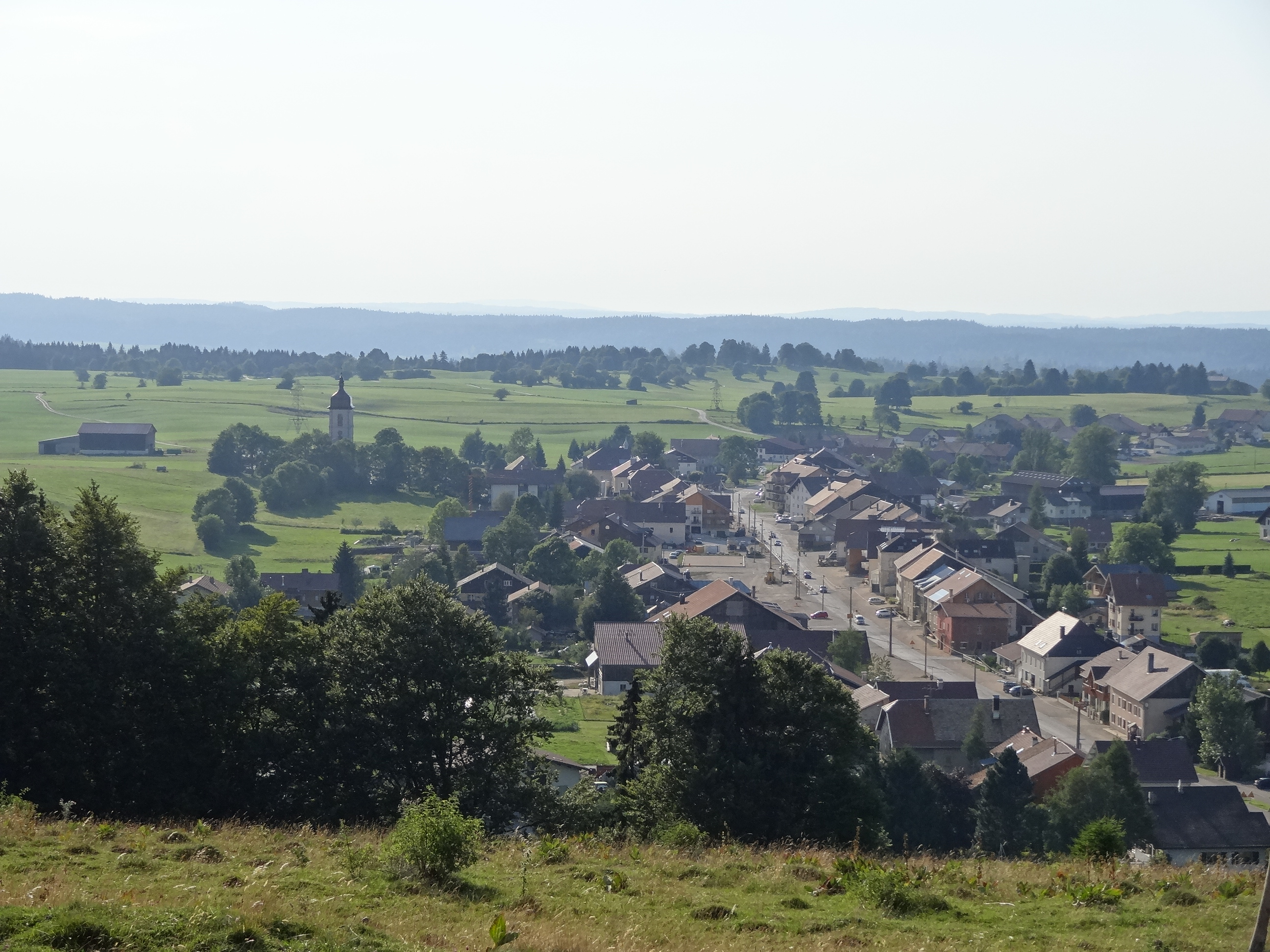 Les Fourgs (Doubs) - vue générale depuis la chapelle du Tourillot